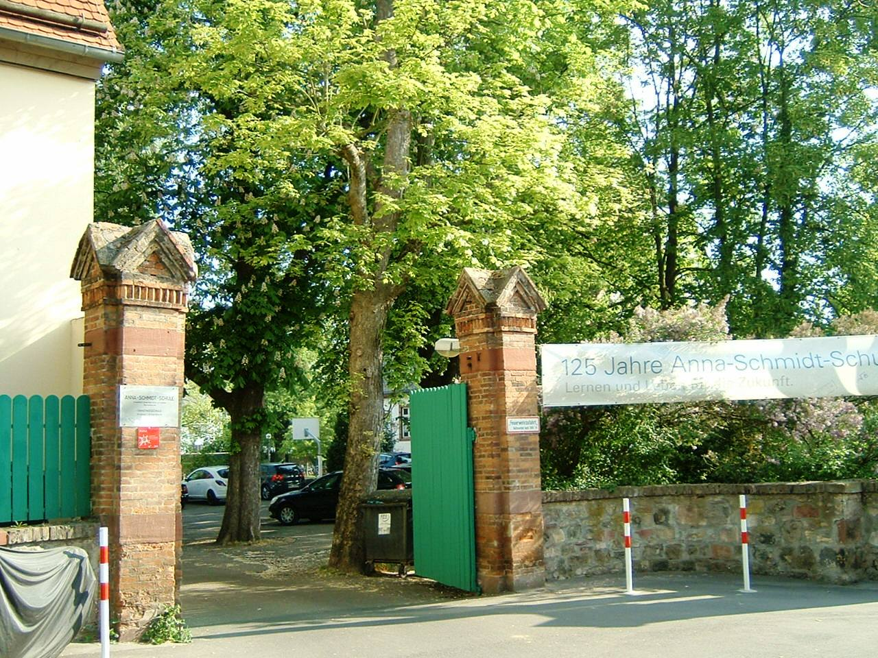 Eingang zum Gelände der Anna Schmidt Schule in Frankfurt Nieder Erlenbach